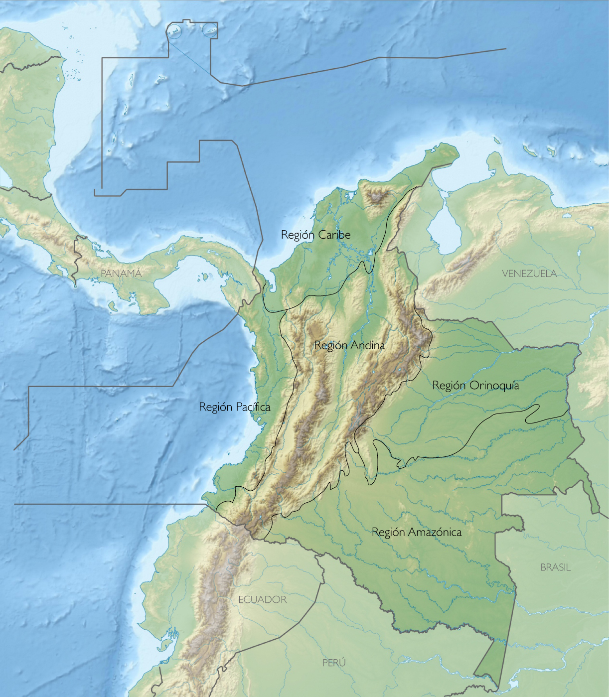 Regiones naturales de Colombia